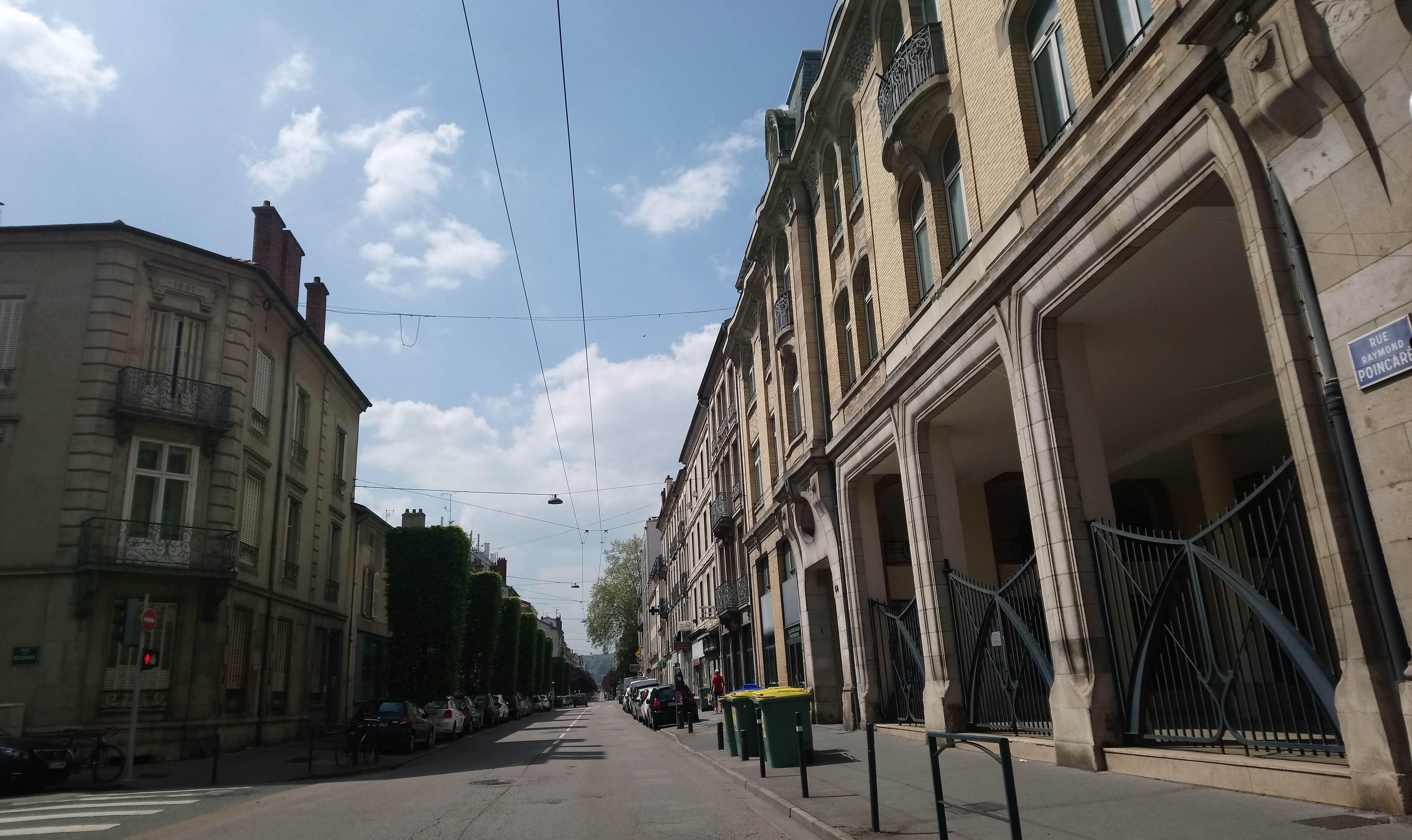 rue Raymond-Poincaré, vers le milieu de la rue